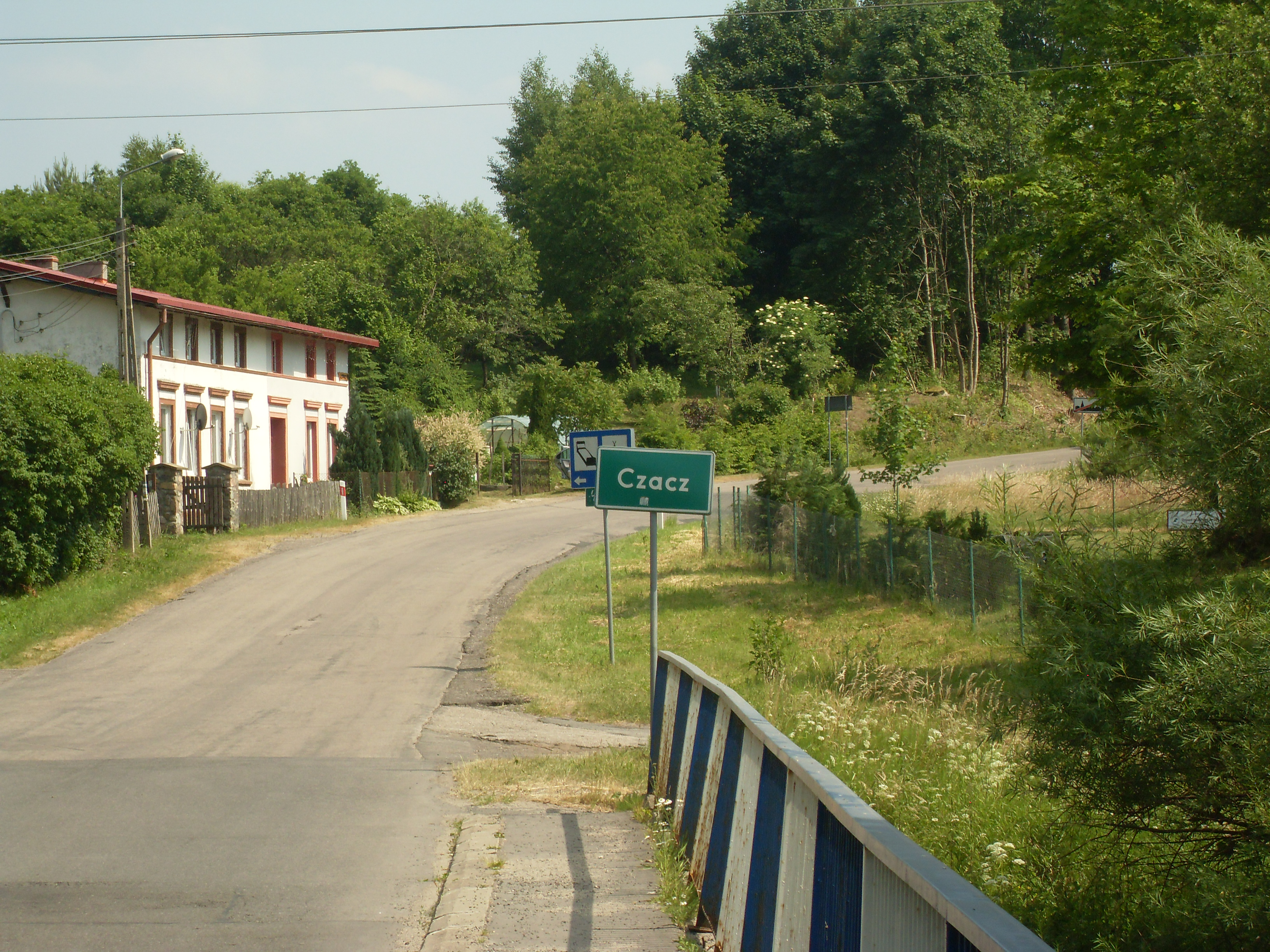 Osada Czacz